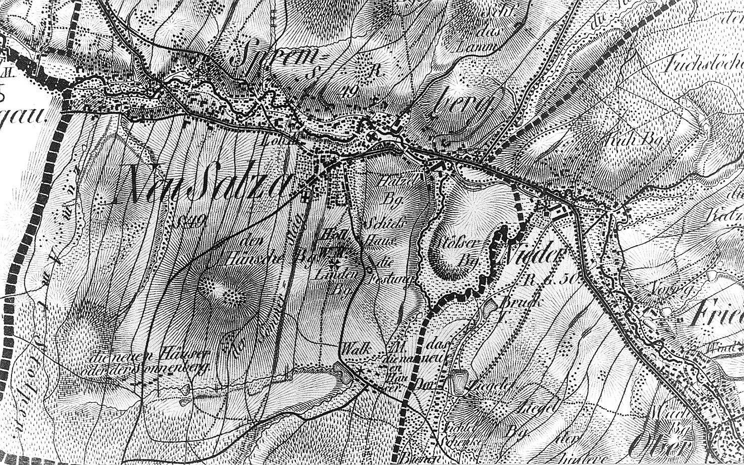 Original image description from the Deutsche Fotothek Neusalza-Spremberg. Oberreit, Sect. Stolpen, 1821/22